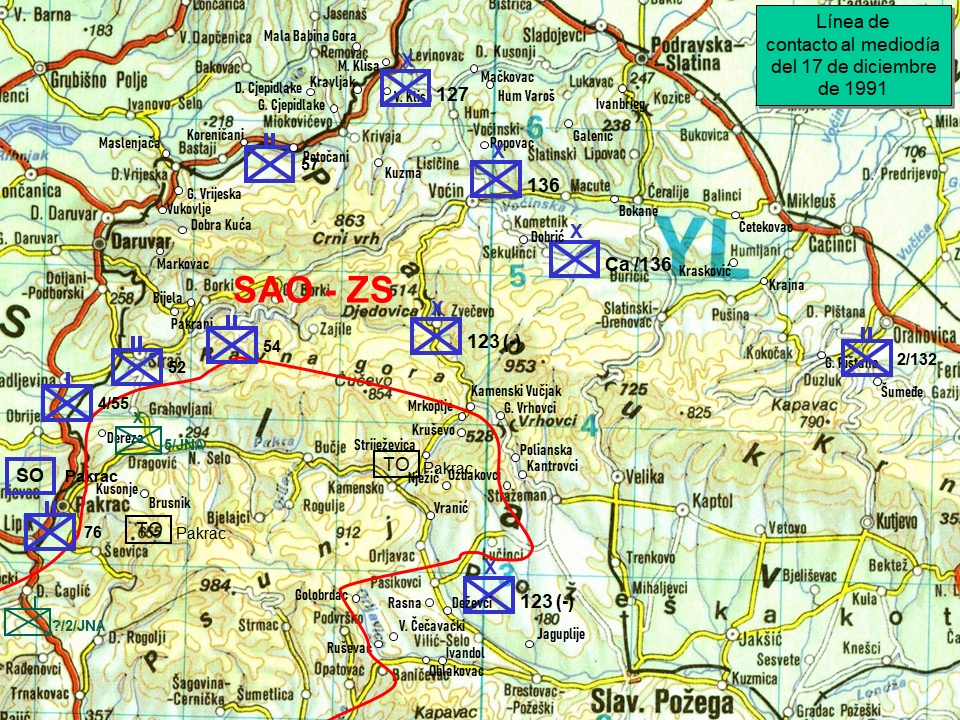 Situación durante Papuk-91 al 17 de diciembre. Según Martinić Jerčić, Natko (11 de diciembre de 2014). «Oslobodilačke Operacije Hrvatskih Snaga u Zapadnoj Slavoniji u Jesen i Zimu 1991./1992. godine» [Operaciones de liberación de las fuerzas croatas en Eslavonia occidental en otoño e invierno 1991/1992.]. Tesis Doctoral (en croata) (Zagreb: University of Zagreb. Department of Croatian Studies.). Consultado el 10 de mayo de 2020.